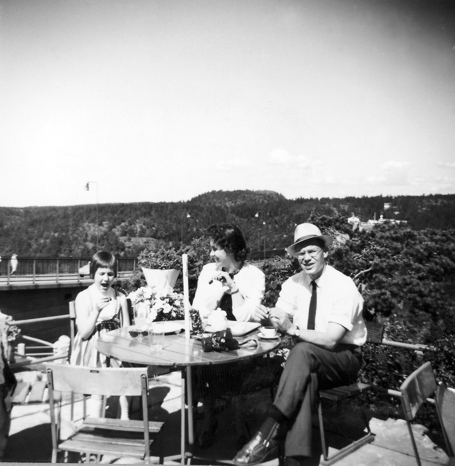 Risto Santala vaimon ja tytön kansa Norjassa 1962.